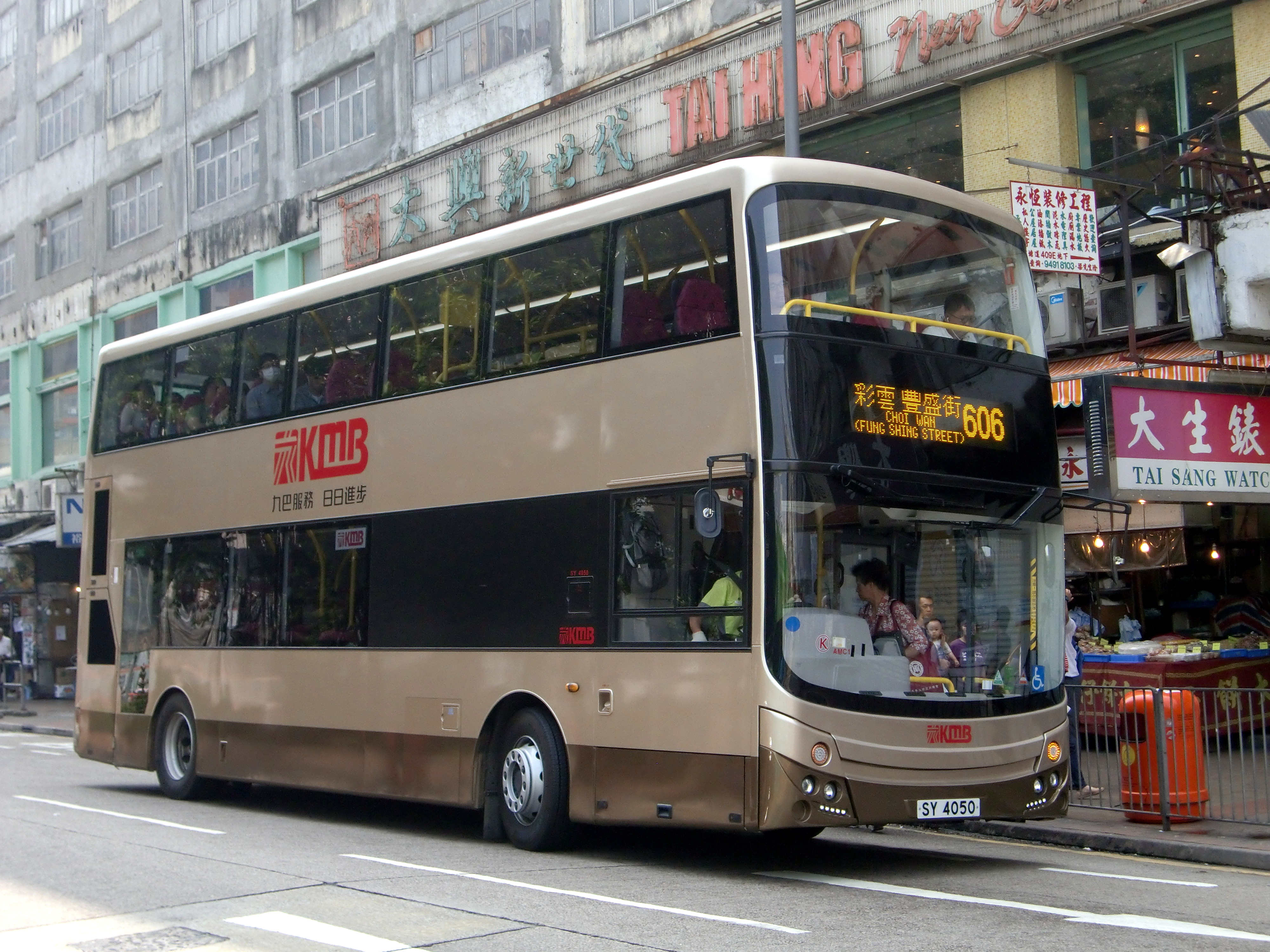 香港專營巴士中首輛荷蘭VDL DB300雙軸雙層低地台空調巴士（AMC1／SY4050），配MCV D102RLE-HK車身，於2014年10月13日起加入成為606線掛牌車